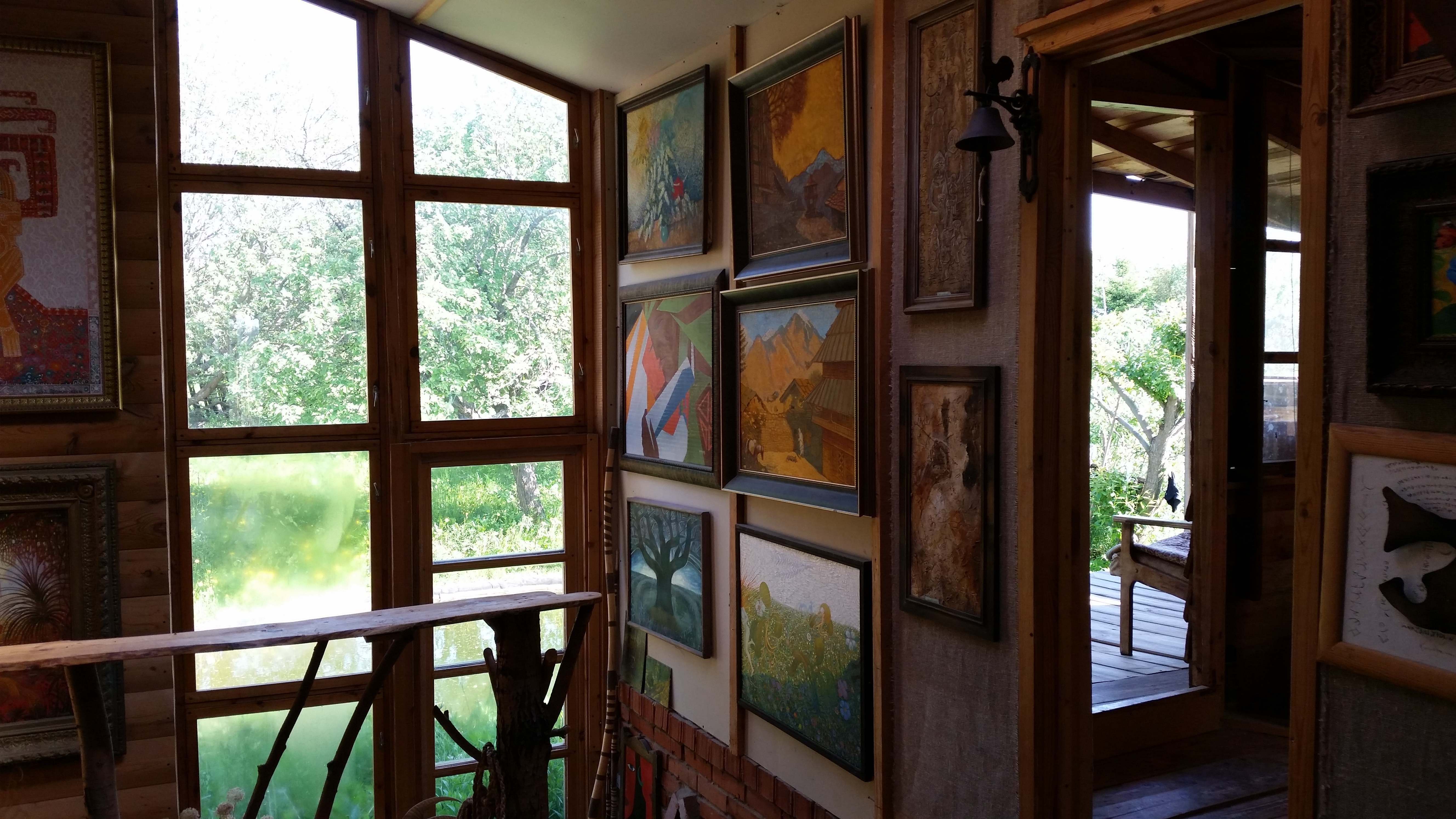 Часть комнаты в доме-мастерской заслуженного художника Чувашской Республики Г.Г. Фомирякова, с живописными картинами 1990-х годов и видом в сад. Фотография - май 2015 г. Чувашская Республика, Чебоксарский район, д. Чиганары. Фотография выполнена по разрешению художника, для исследовательской работы и последующей публикации в просветительских целях.